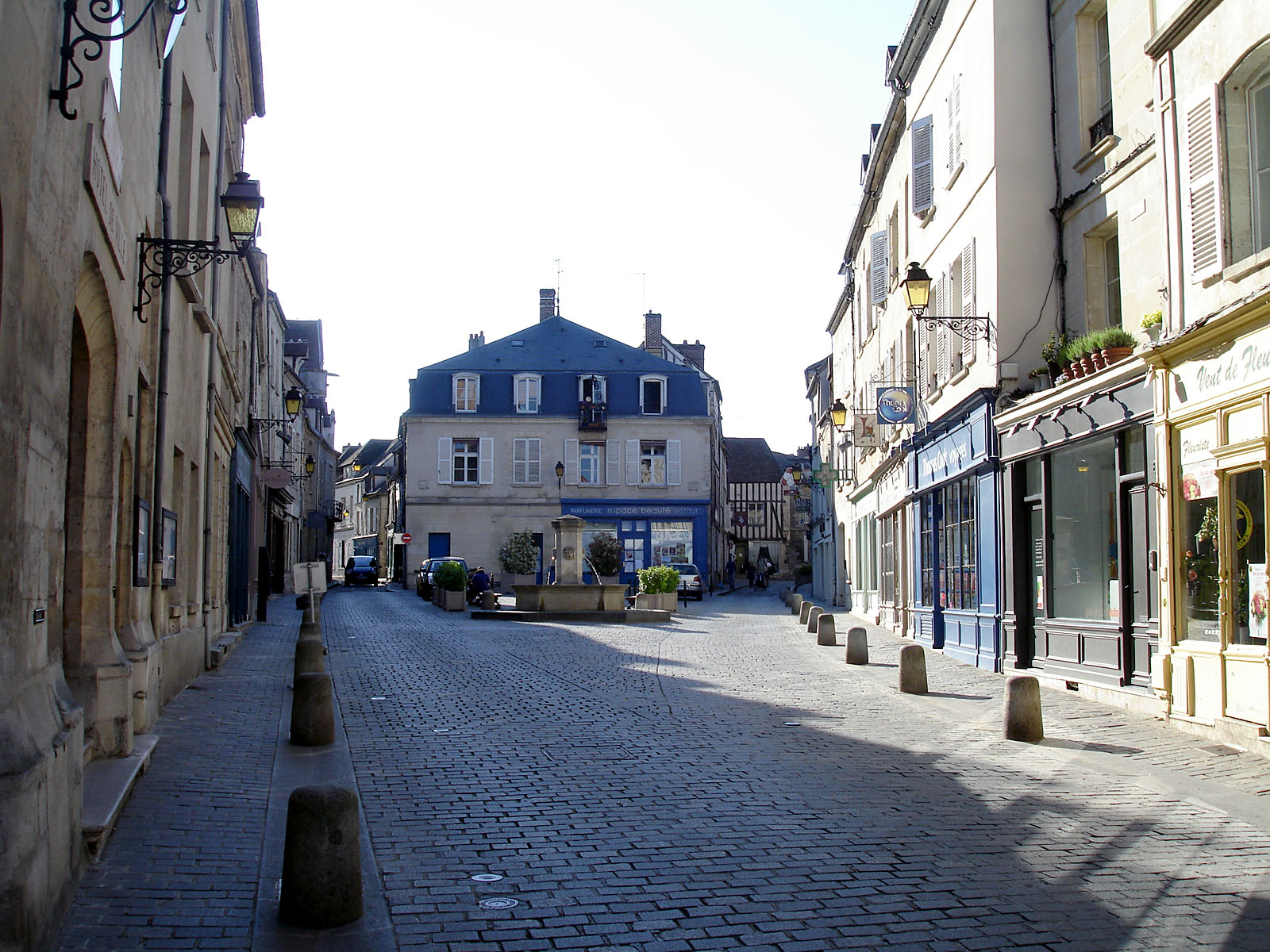 La place Henri IV à Senlis, Oise, France.